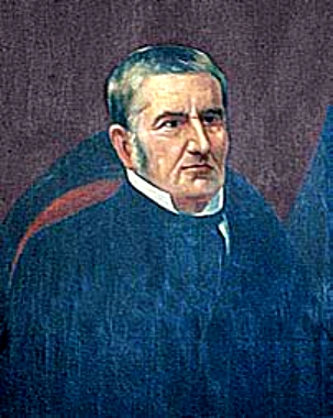 Francisco Javier Mariátegui y Tellería (1793 -1884) abogado, político, escritor, diplomático, periodista e ideólogo liberal peruano. Prócer de la Independencia del Perú.